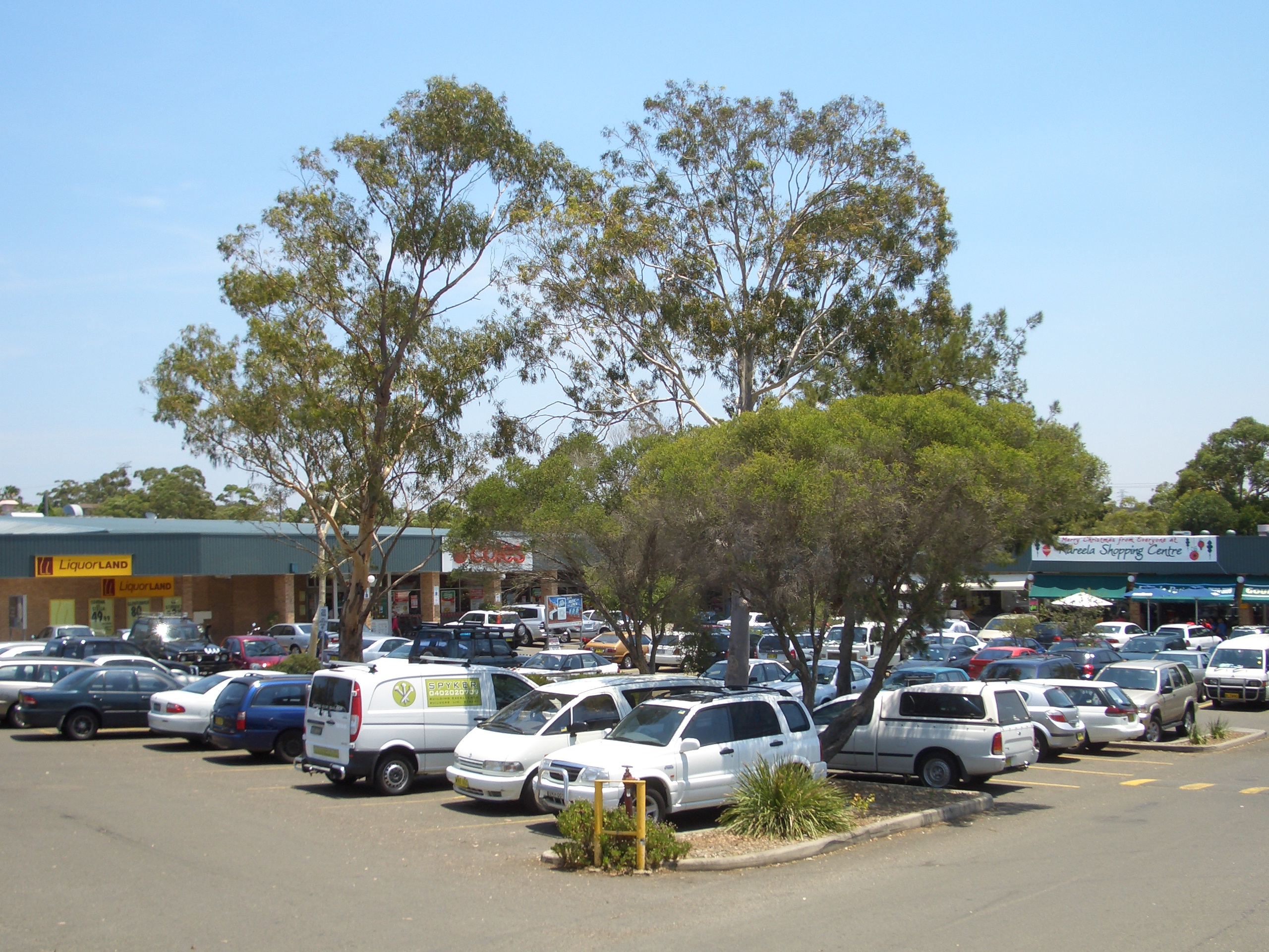 Kareela